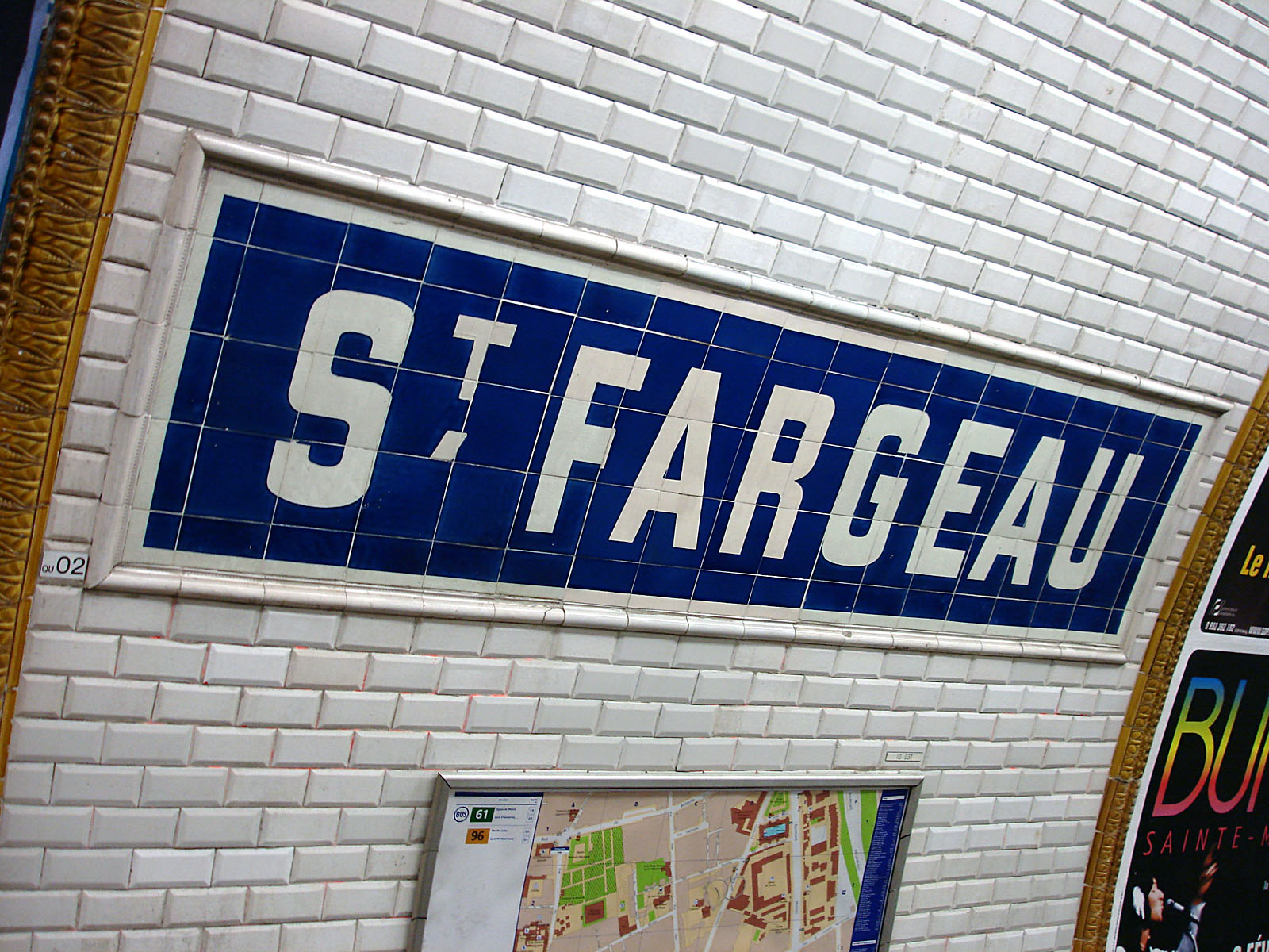 Panneau de la station Saint-Fargeau de la ligne 3 bis du métro de Paris, France.